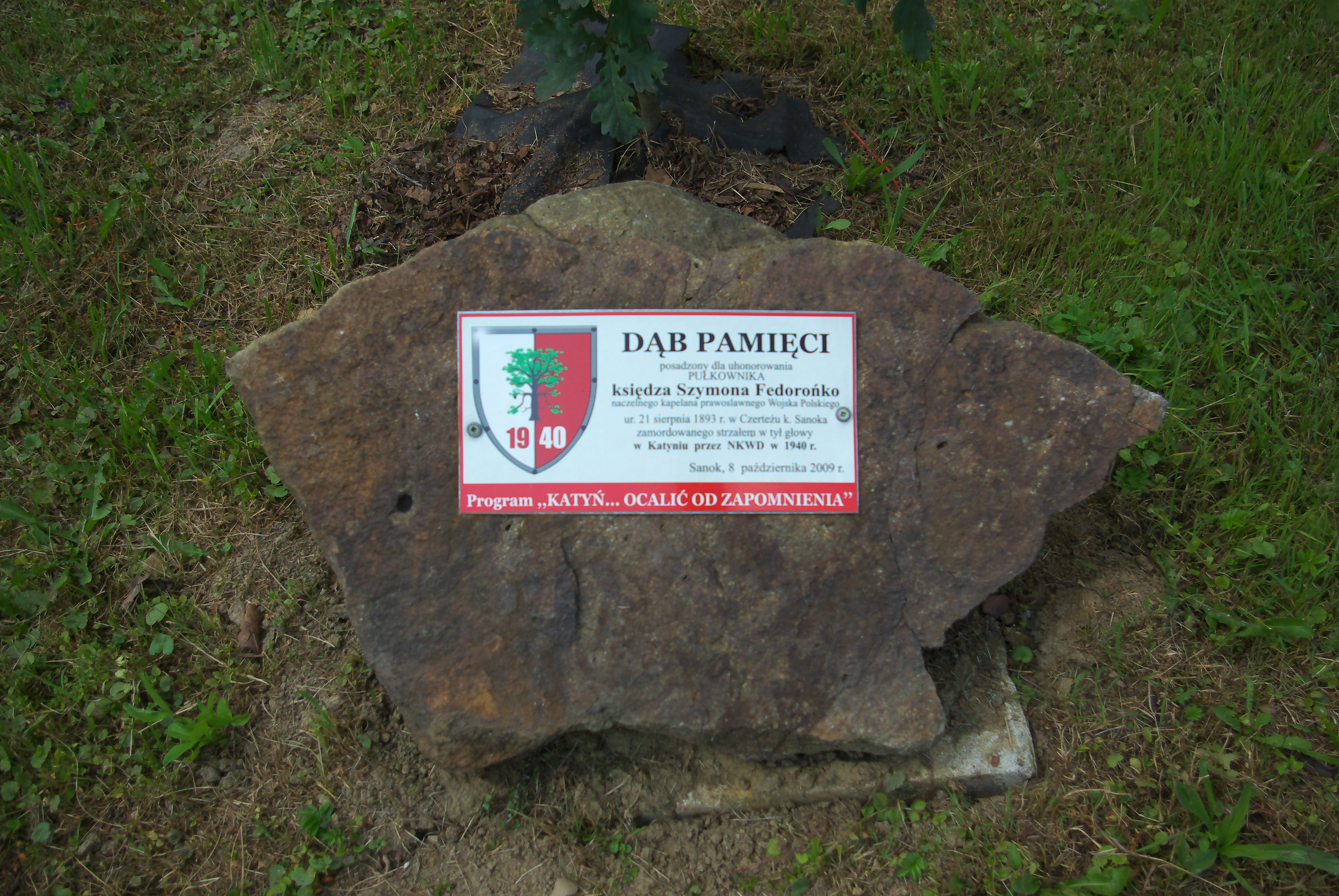 Dąb Pamięci Szymona Fedorońko w ramach Pomnika Golgota Wschodu na Cmentarzu Centralnym w Sanoku.